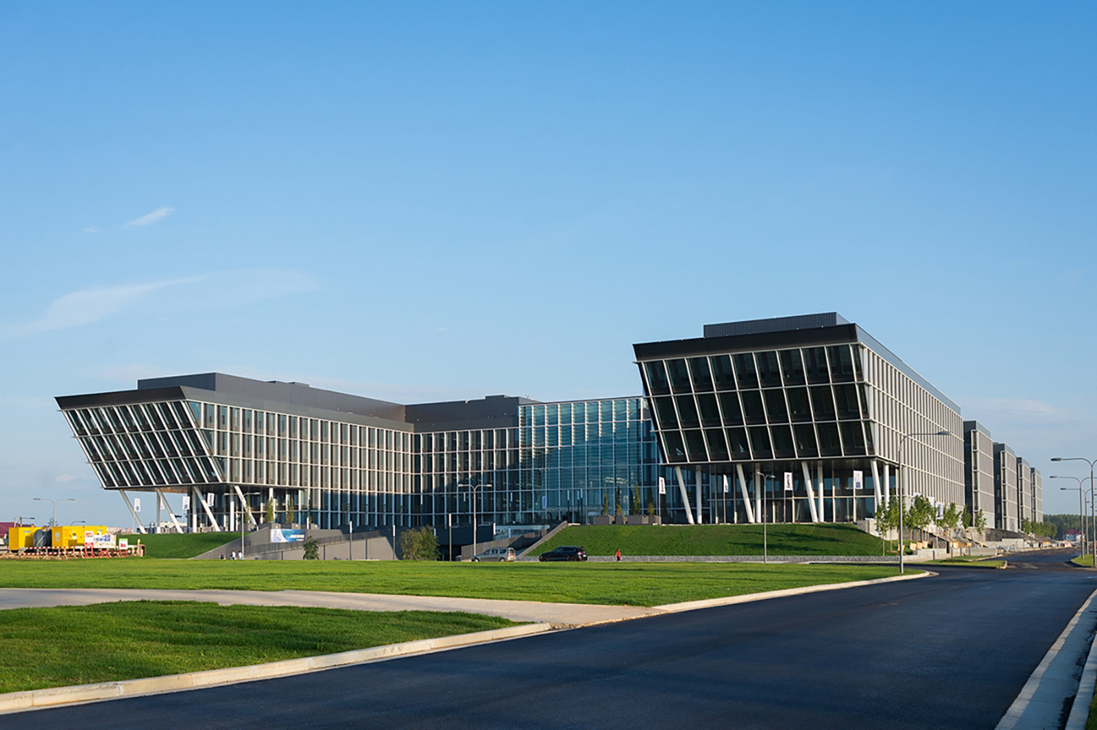 Офисный центр "Комсити" в Румянцево